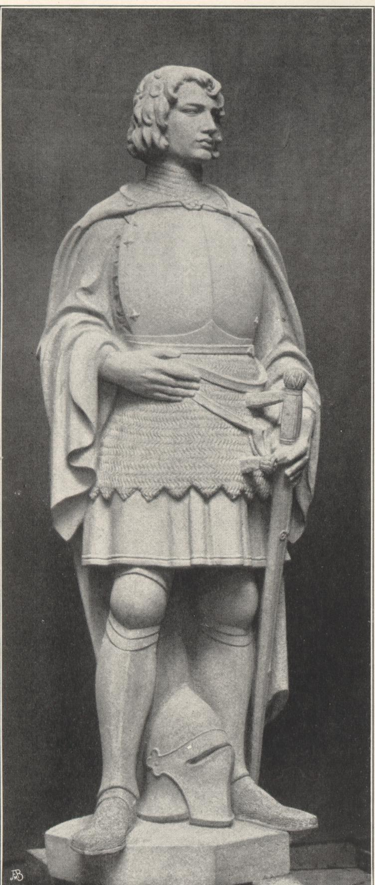 Pfalzgraf Rudolf II., Statue von Hubert Netzer, 1910